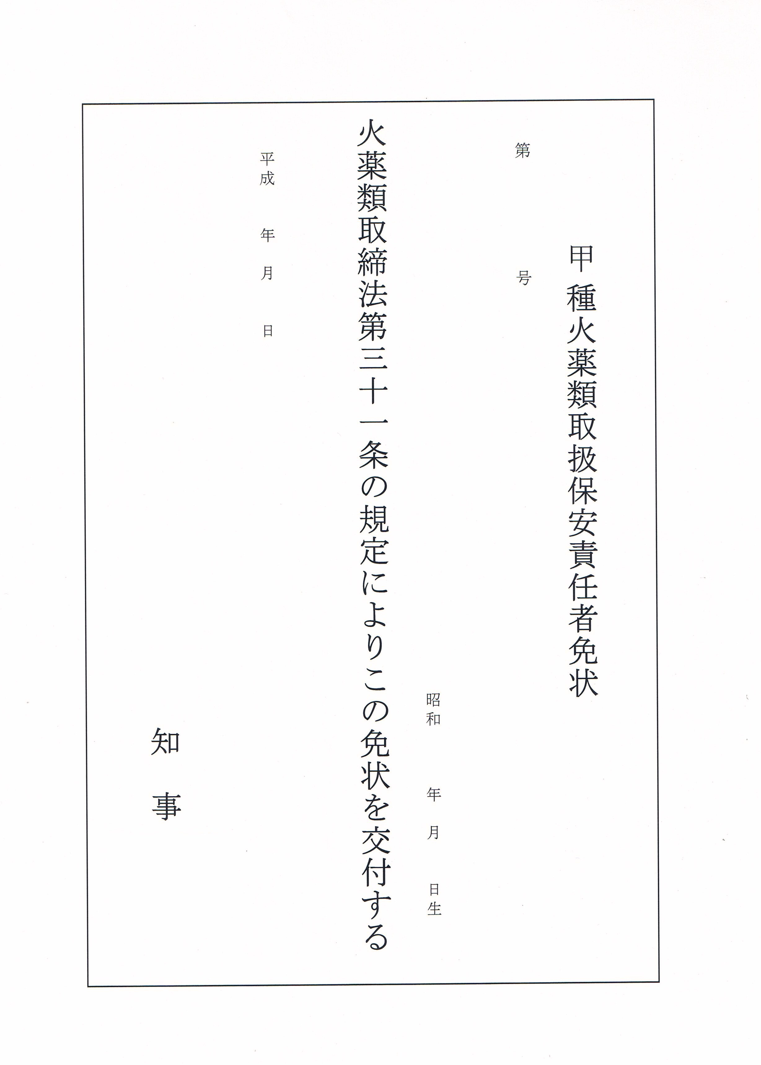 投稿者所有甲種火薬類取扱保安責任者免状。個人情報部分などを削除加工。日本国免状。